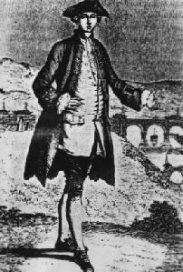 Scroop Egerton, 1st Duke of Bridgewater (1681-1744).